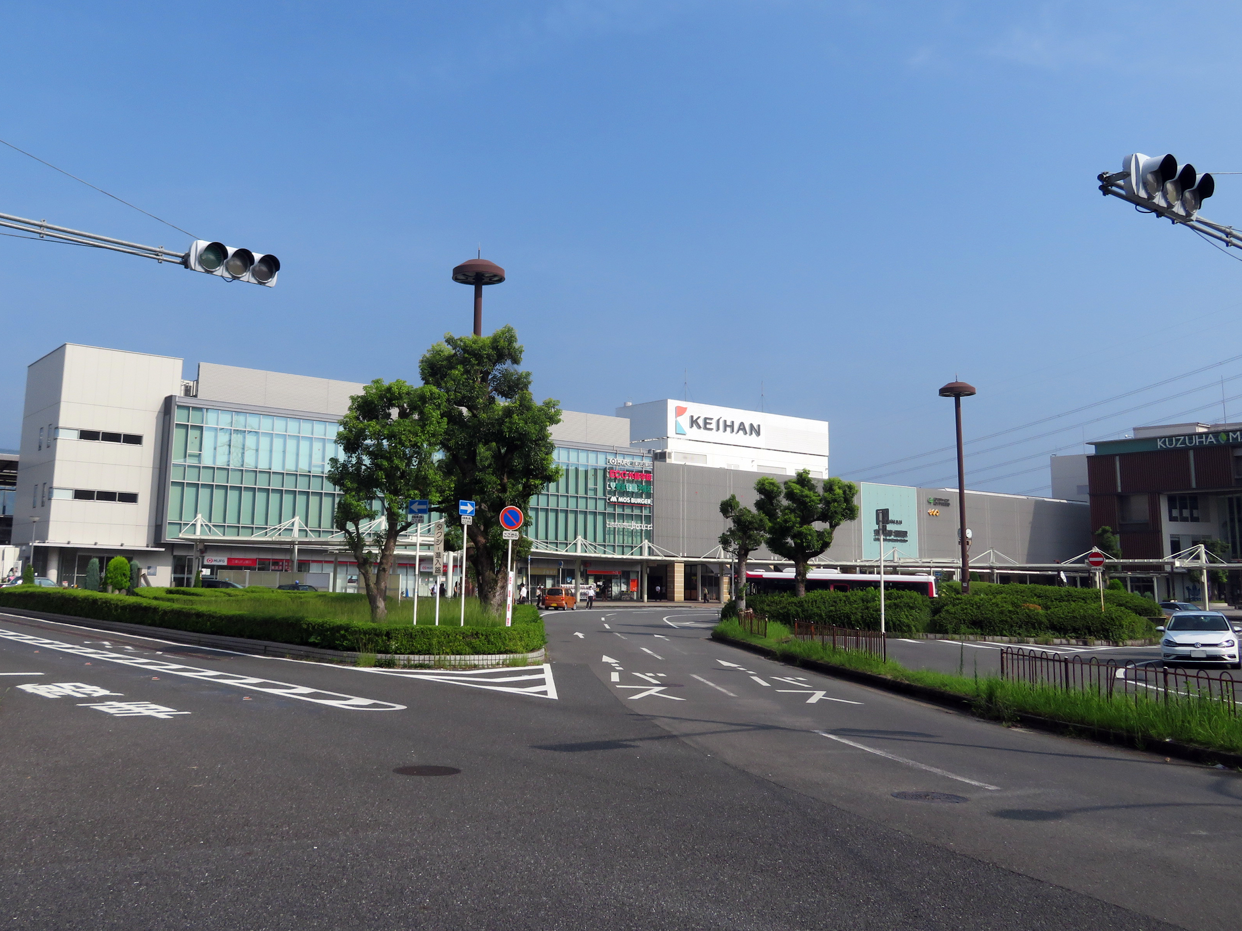 京阪樟葉駅を撮影。